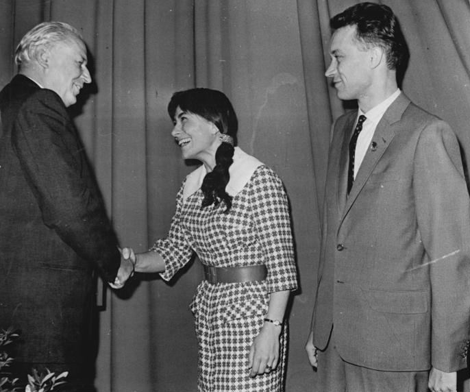 Zentralbild Eckleben 19.6.1961 3. Arbeiterfestspiele des FDGB. Literatur- und Kunstpreis des FDGB 1961 verliehen. Der Literatur- und Kunstpreis des FDGB 1961 wurde anlässlich der 3. Arbeiterfestspiele am 16.6.1961 in der Magdeburger Parkgaststätte "Herrenkrug" verliehen. Die Auszeichnung nahm der Vorsitzende des FDGB-Bundesvorstandes, Herbert Warnke, vor. UBz: Herbert Warnke verleiht Brigitte Reimann und Siegfried Pietschmann den Literaturpreis des FDGB 1961.